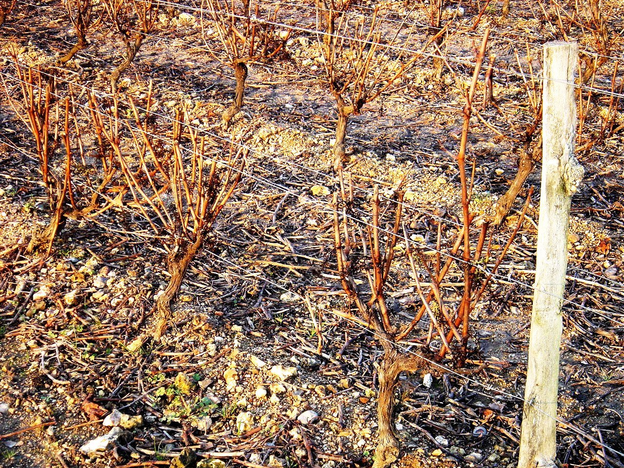 Vignes après une pré-taille mécanique